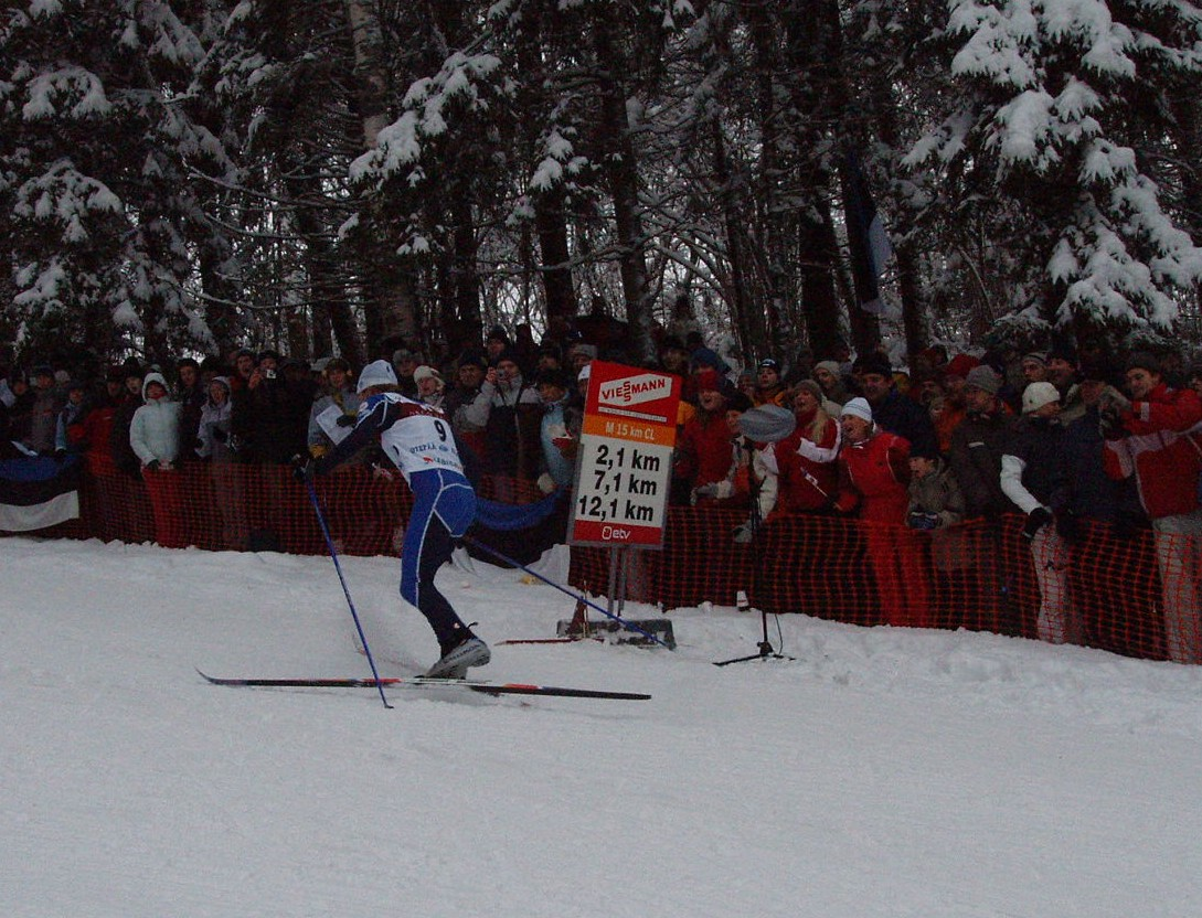 Kaspar Kokk Otepää MK etapil 2006. aastal